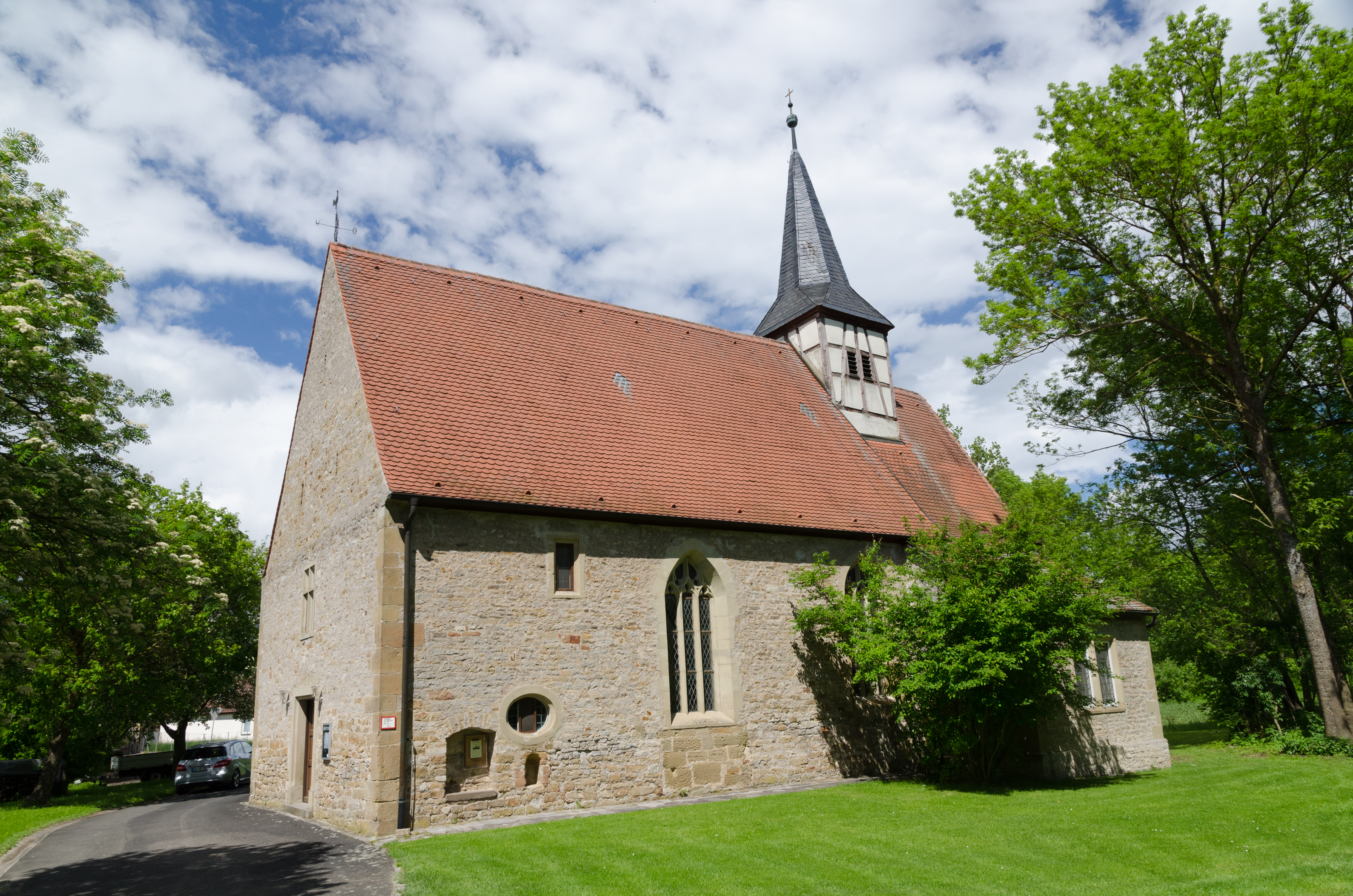 Wässerndorf, Kirche St. Cyriakus, Schulgasse 3